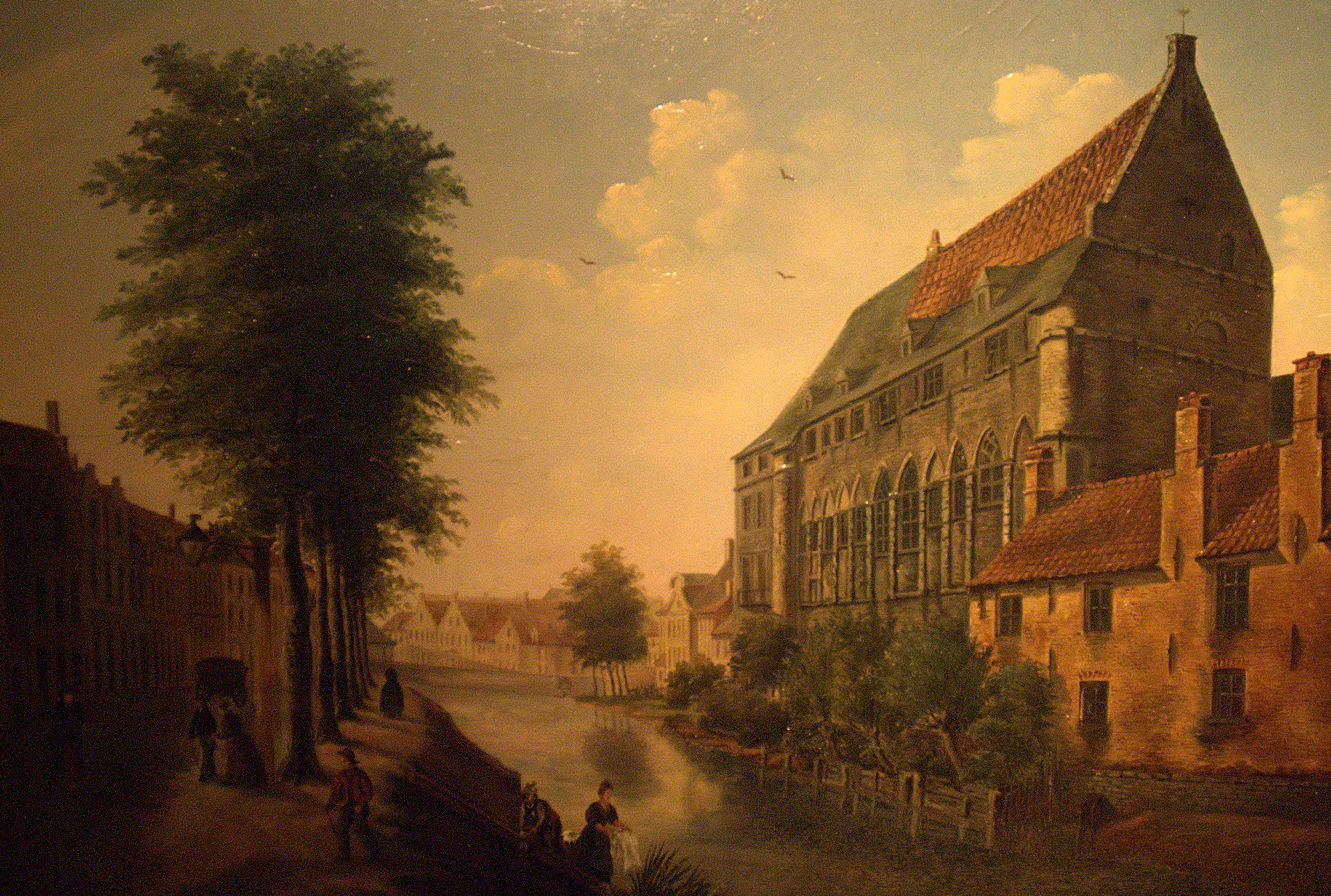 Geeraard de Duivelsteen op een 19e-eeuwse schilderij van Joseph van Haerde in het Museum Dr. Guislain te Gent (België)